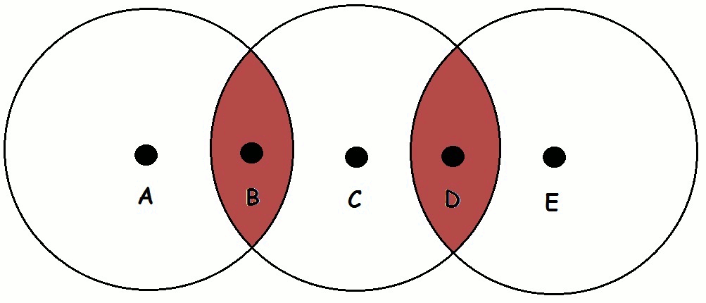 No aprovechado